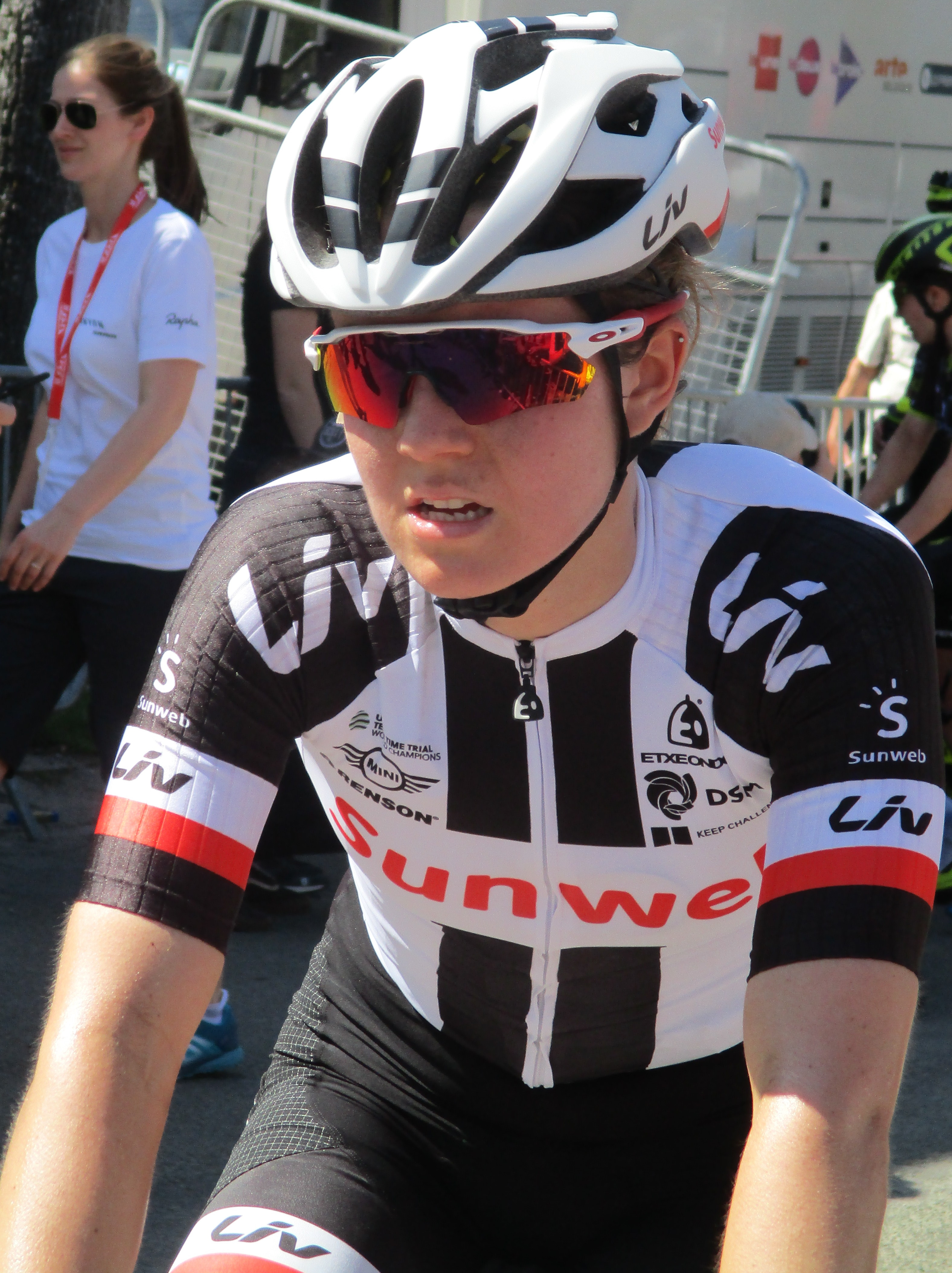 Finish van de Waalse Pijl 2018 op de Mur van Huy.